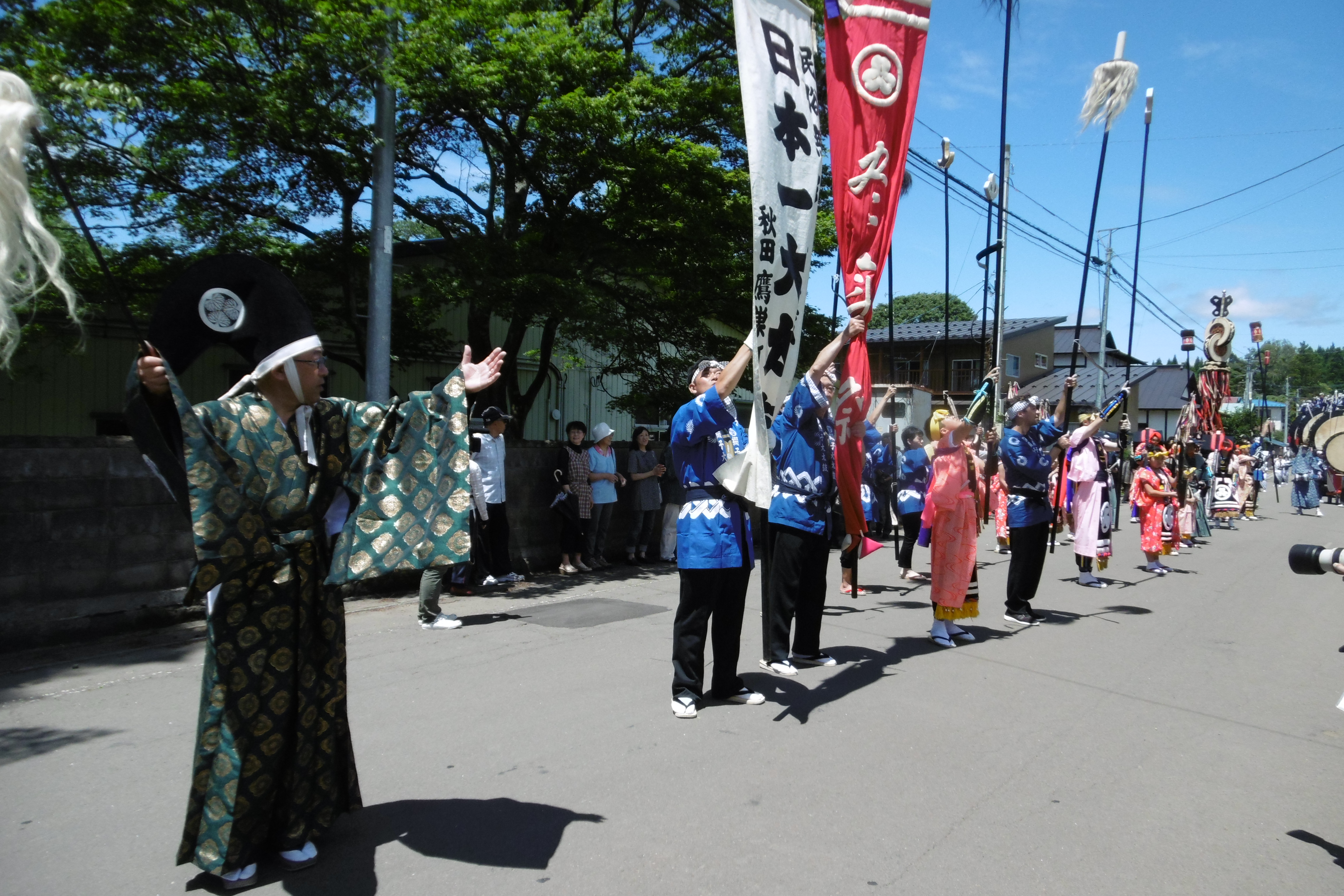 八幡宮綴子神社例大祭 出陣行列（上町）